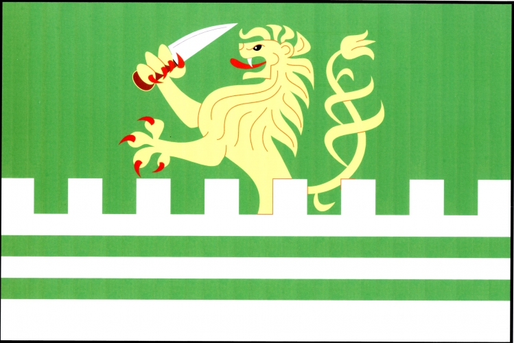 vlajka, Kyjovice, okres Znojmo